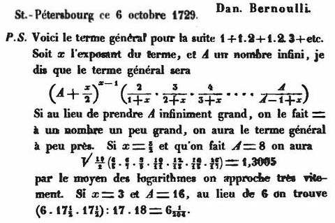 Daniel Bernoulli, Lettre à Goldbach, 1729-10-06